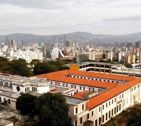 UCSAR